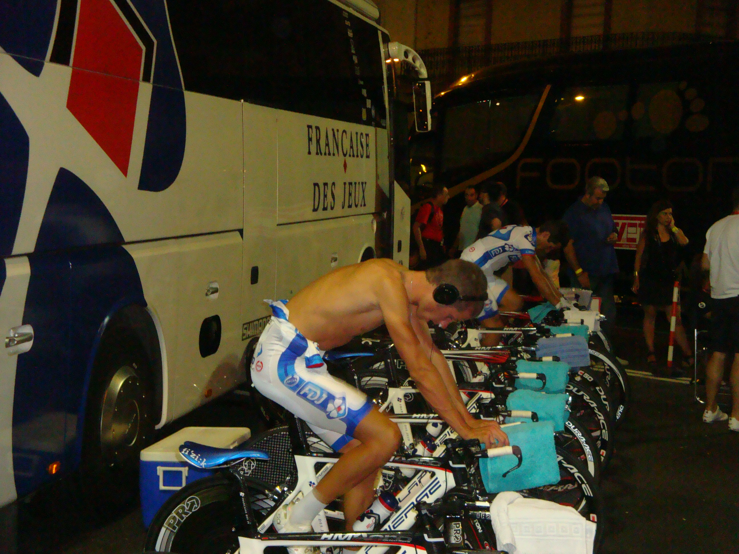 Ciclista en calentamiento. Etapa nocturna. Vuelta a España 2010